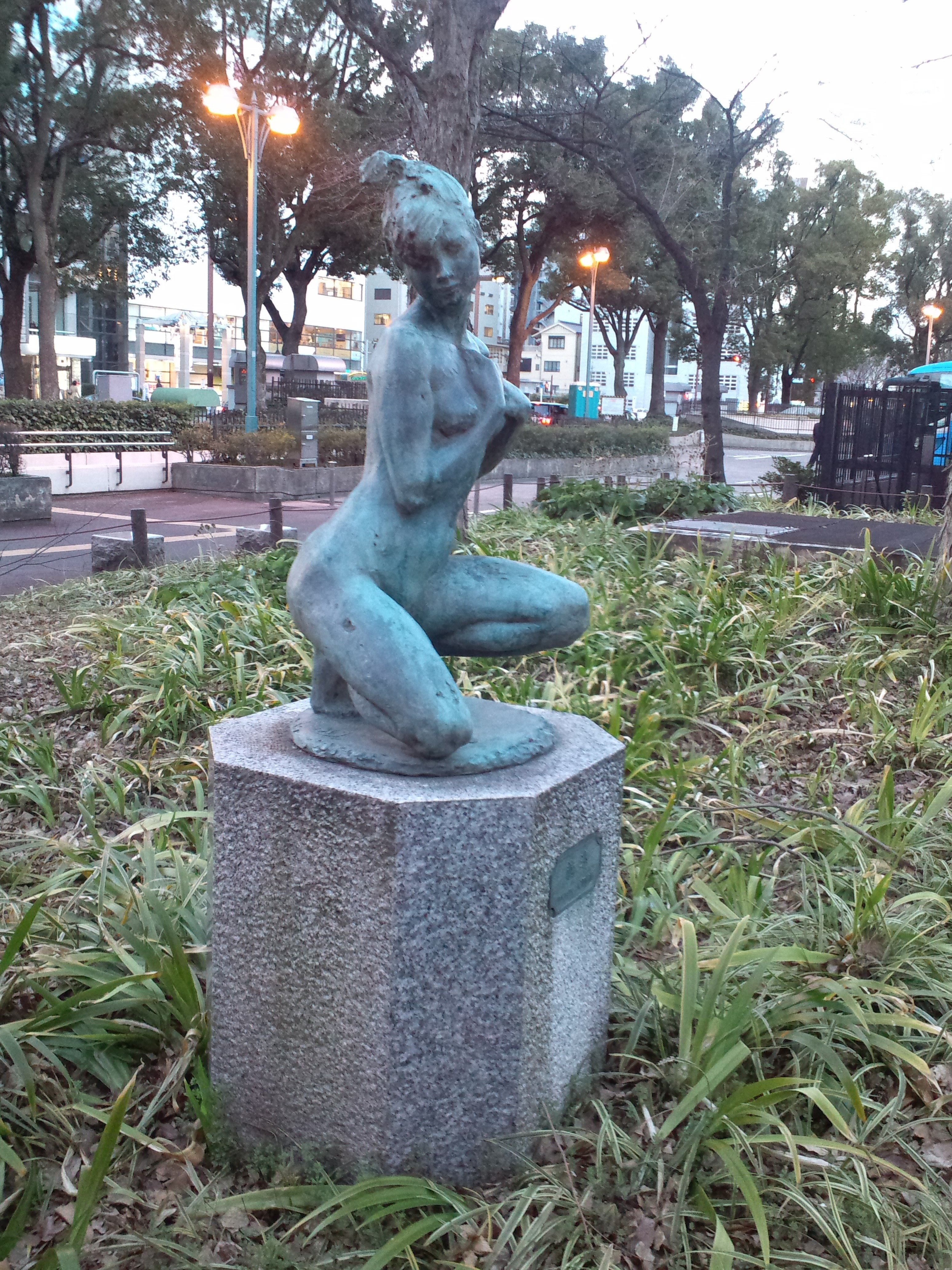 久屋大通公園 彫像